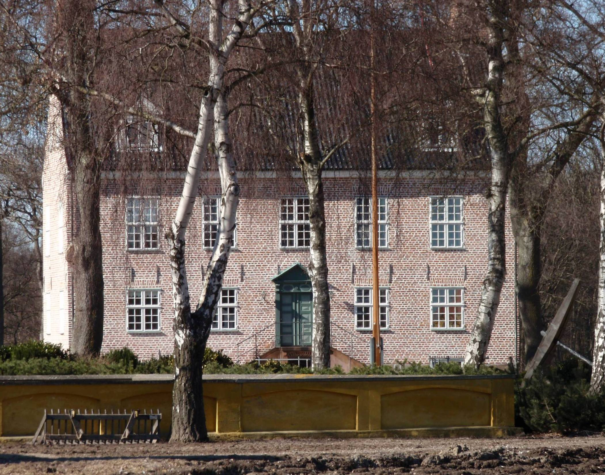 Herregården Bramsløkke, St. Musse, Guldborgsund Kommune